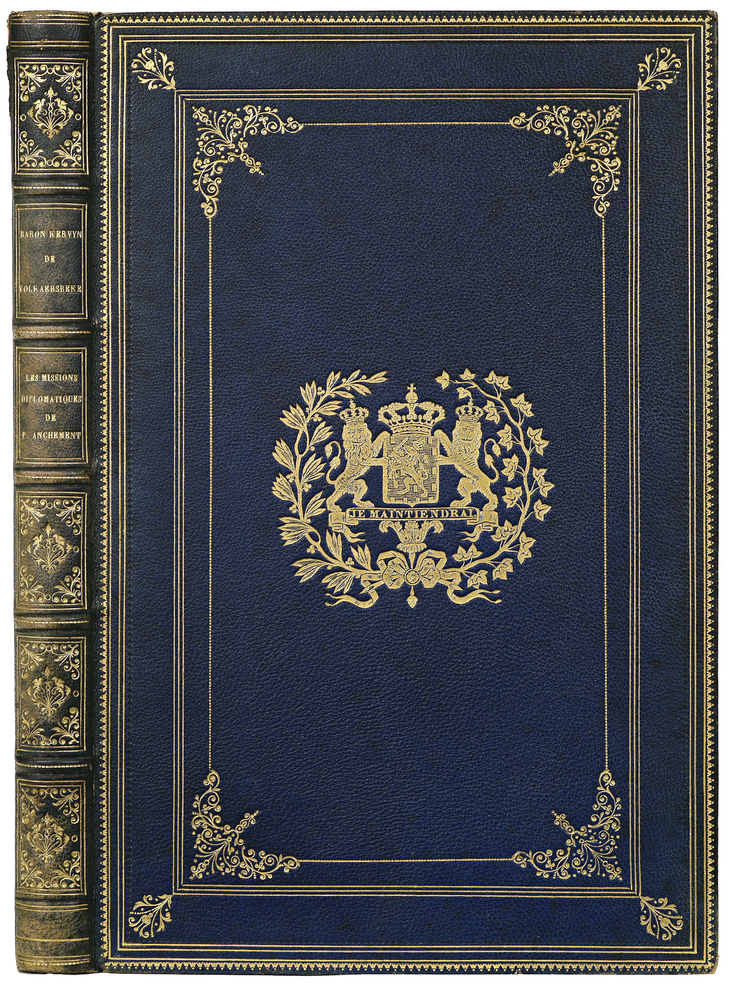 Inhoud: (Le baron) Kervyn de Volkaersbeke. Les missions diplomatiques de Pierre Anchemant, 1492-1506. Gand, 1873.